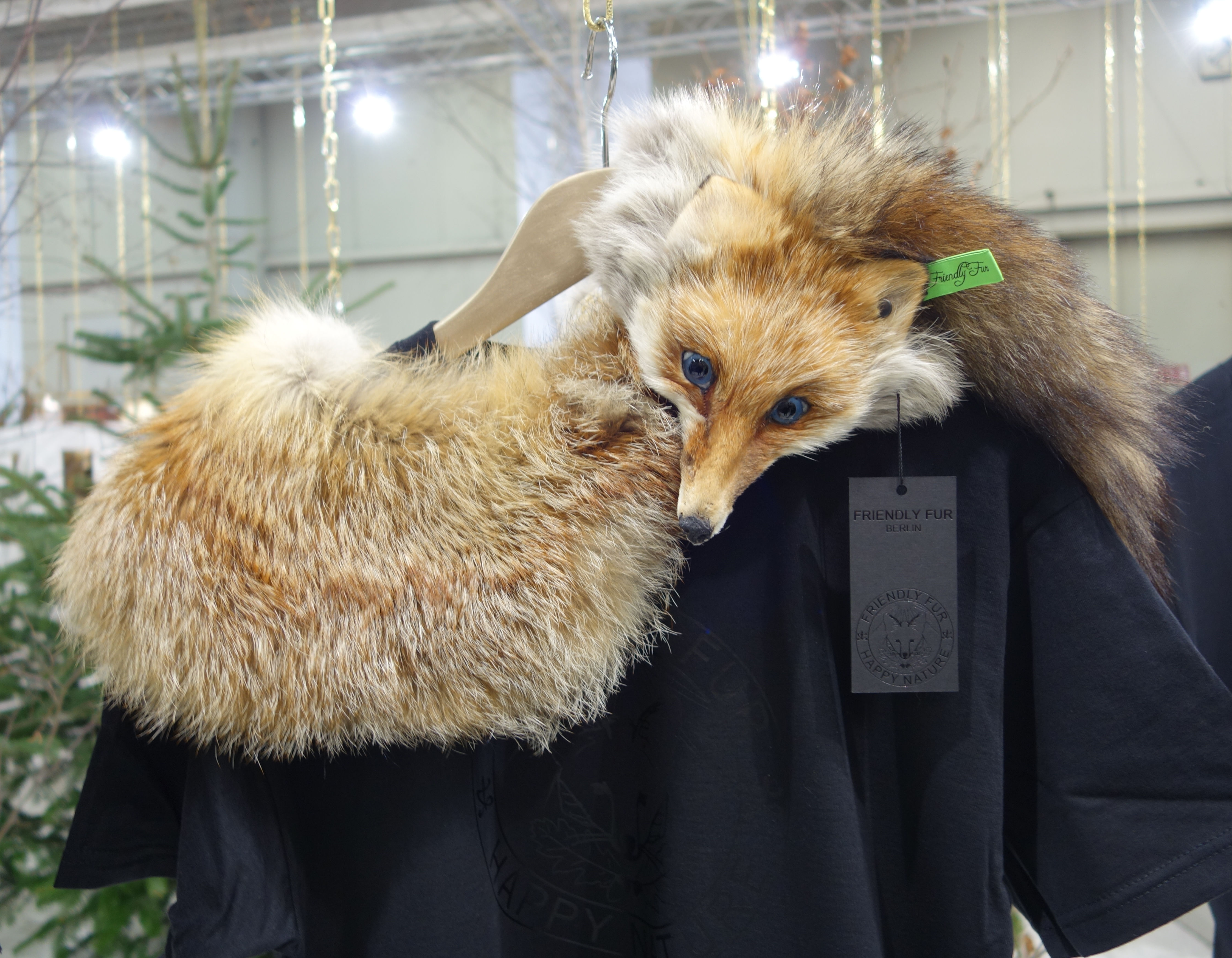 Messe „Jagd & Hund 2016, Westfalenhallen Dortmund“. Gesehen bei Friendly Fur UG, Nikolas Gleber/CEO, Berlin.